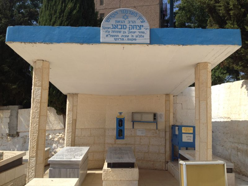 אחוזת קברו של הרב יצחק סבאג ,בית העלמין טירת הכרמל